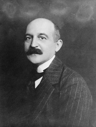 Beöthy László színigazgató, újságíró